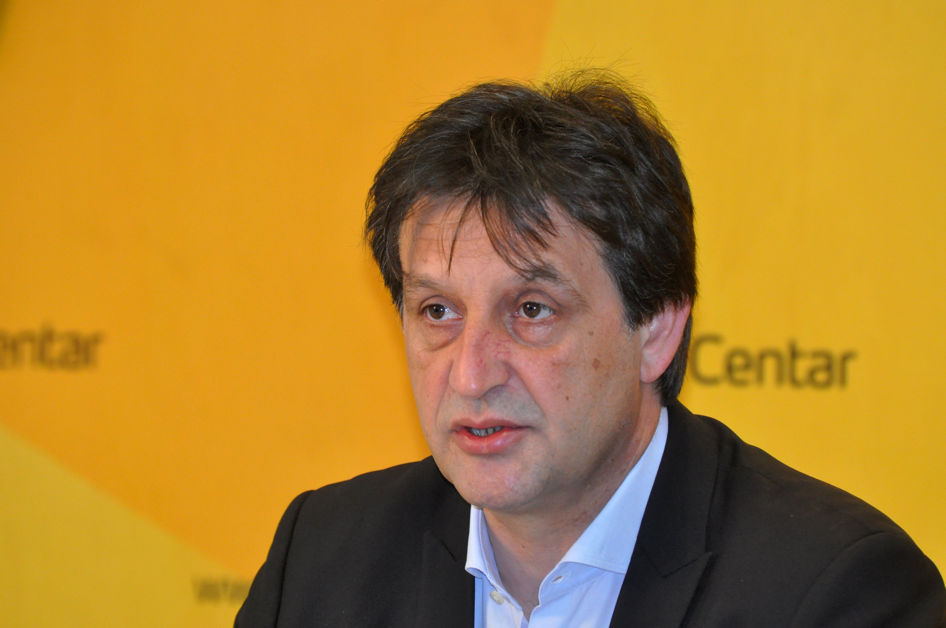 Bratislav Gašić 2015